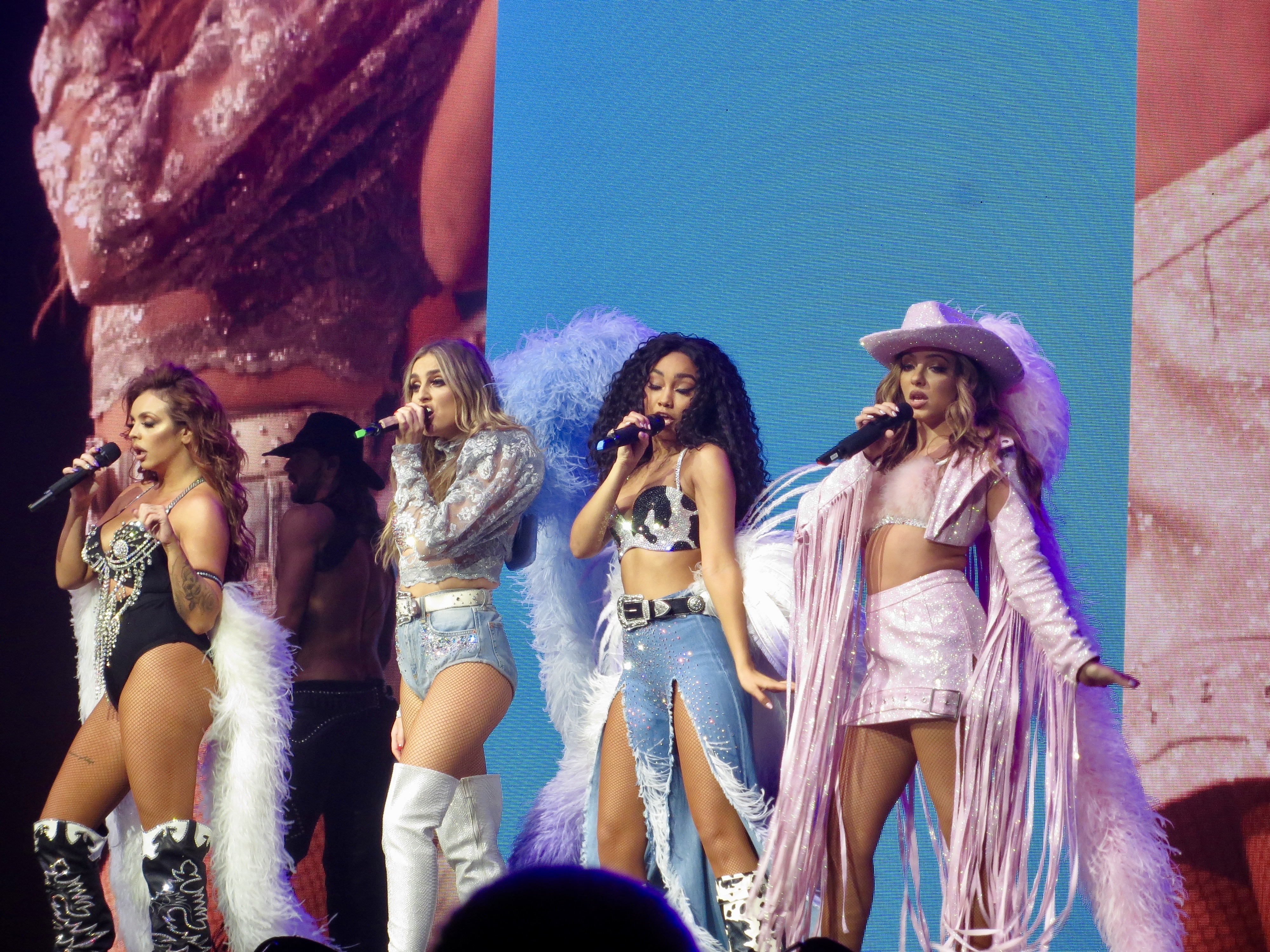 Little Mix 4